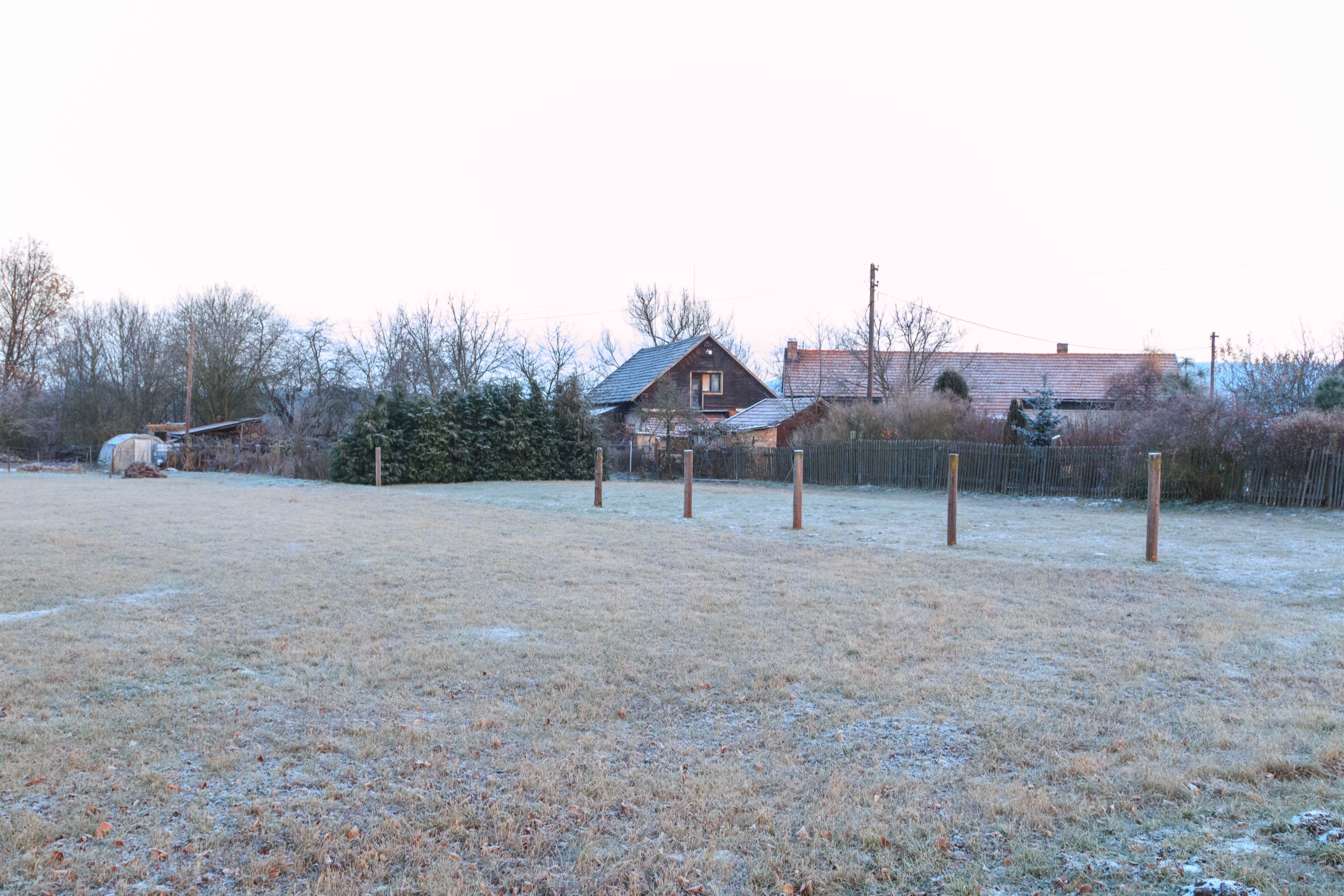 Moravsko u Zdelova